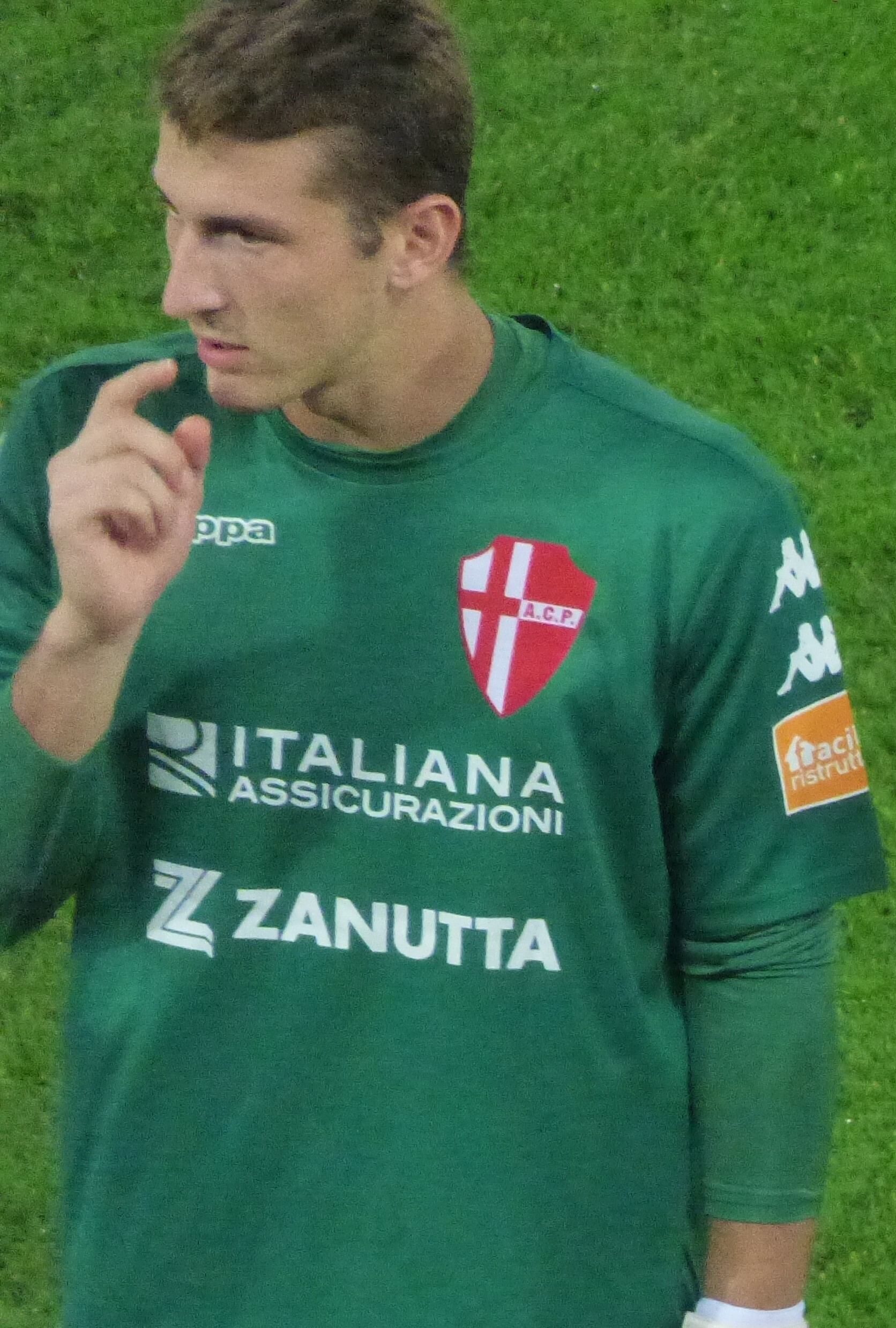 Davide Merelli lors du match amical RC Lens - Calcio Padova, le 11 octobre 2018 au Stade Bollaert-Delelis de Lens.